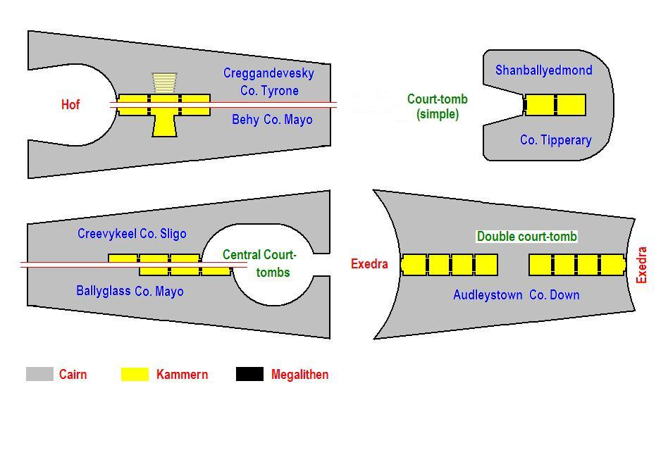 Court tombs